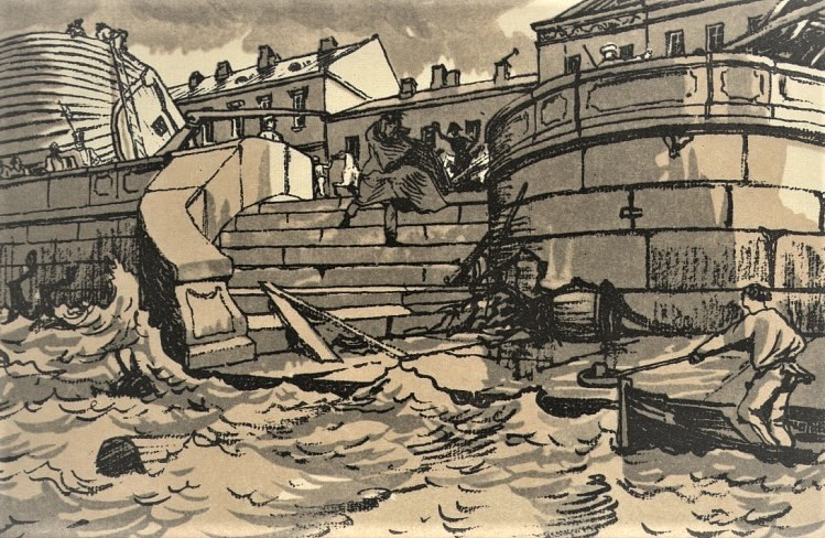 Иллюстрации Бенуа к «Медному всаднику» Пушкина